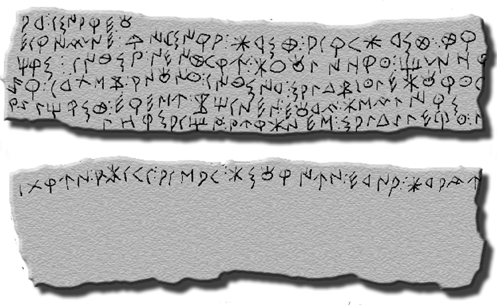 Reproducción de un "documento" ibero hallado en la ciudad gerundense de Ullastret. parece ser, según los estudiosos, que es una carta de a finales del siglo IV a. C., escrita sobre una placa de plomo. Autor de la reproduccion: J.M de la osa Papix